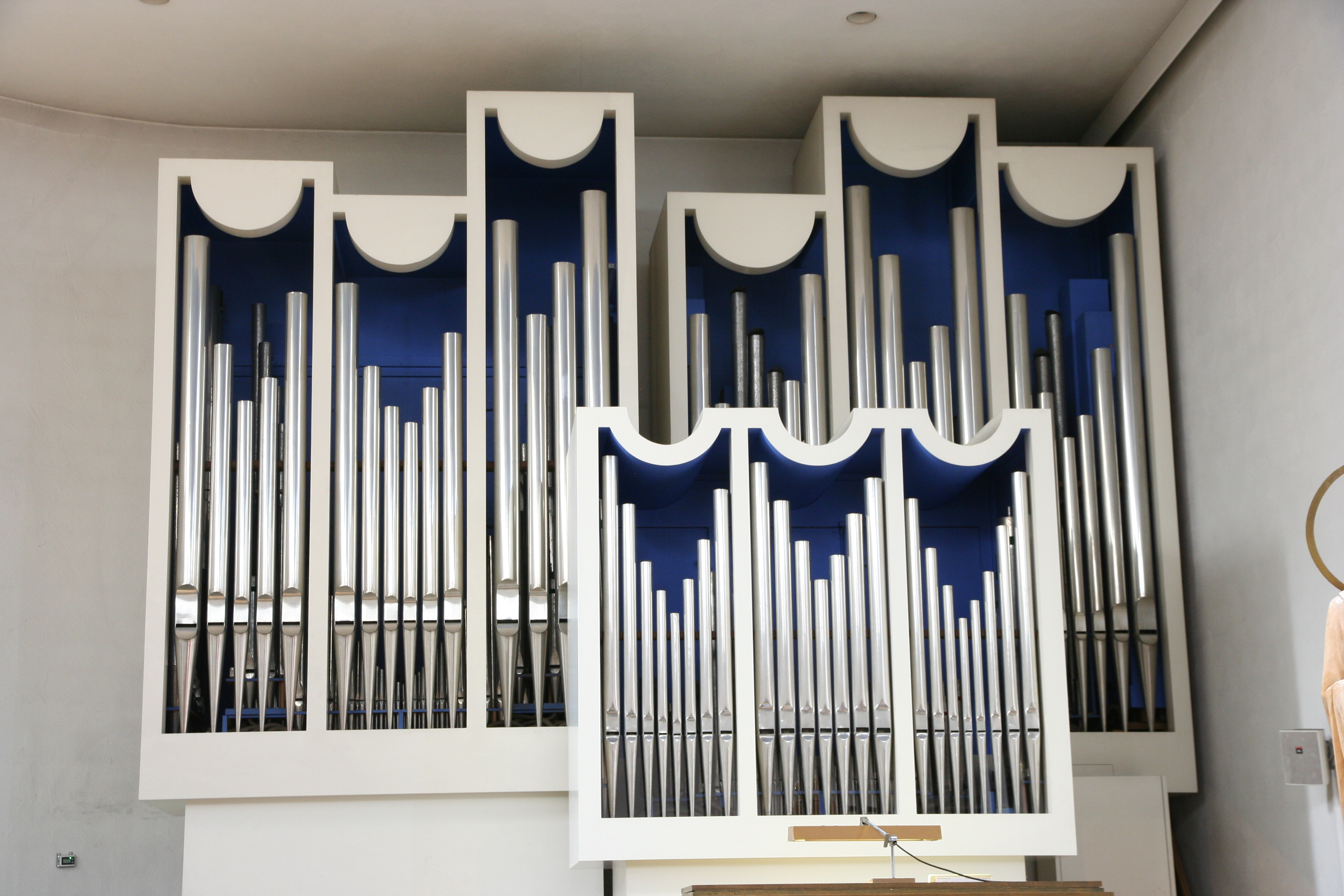 Römisch-katholische Pfarrkirche St. Antonius Münchwilen TG